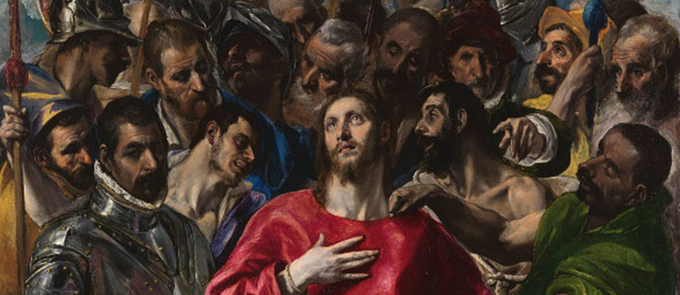 Detalle del cuadro El Expolio, pintado por El Greco y conservado en la sacristía de la catedral de Toledo, (España).